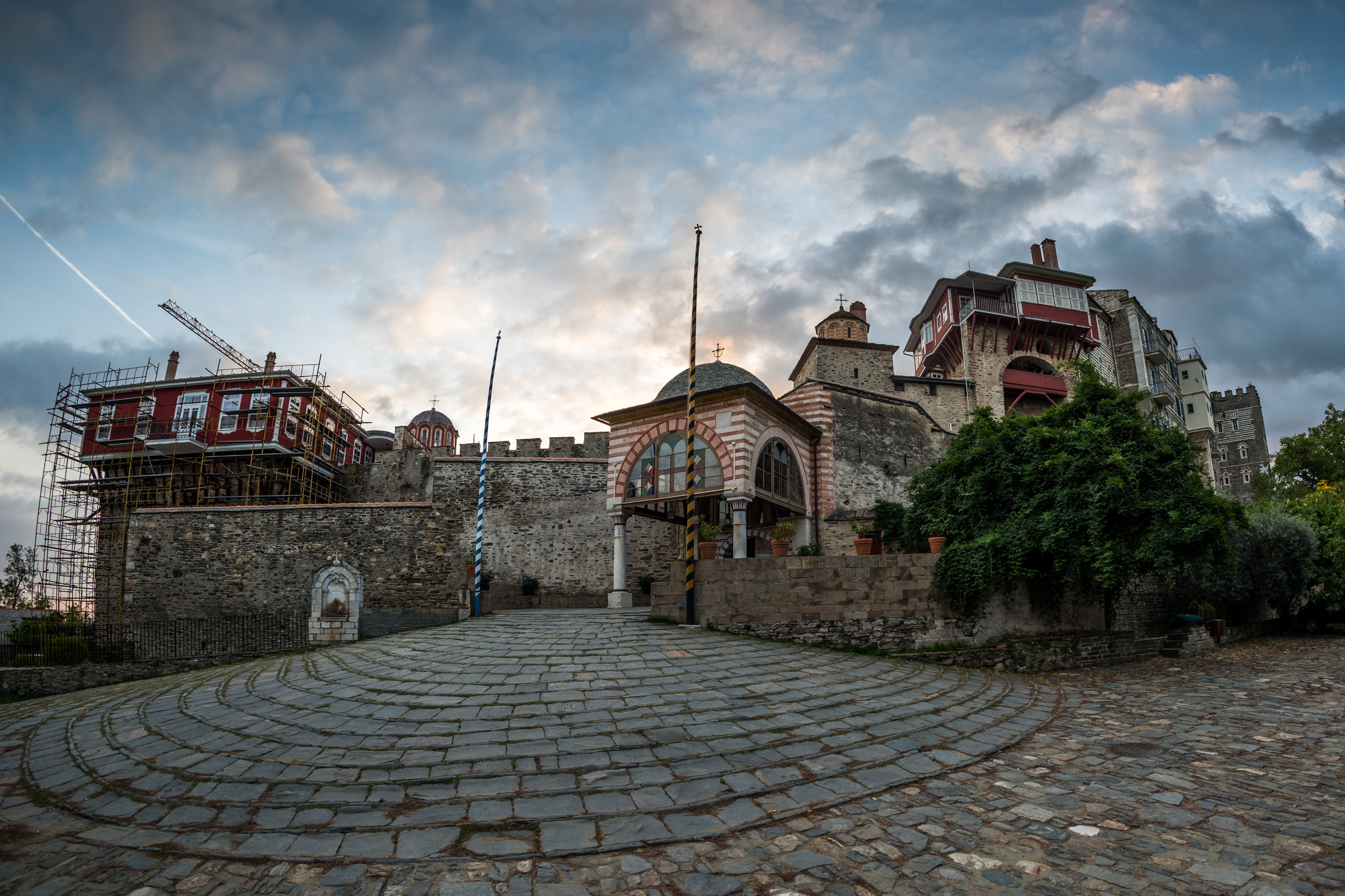 «Μονή Βατοπεδίου»